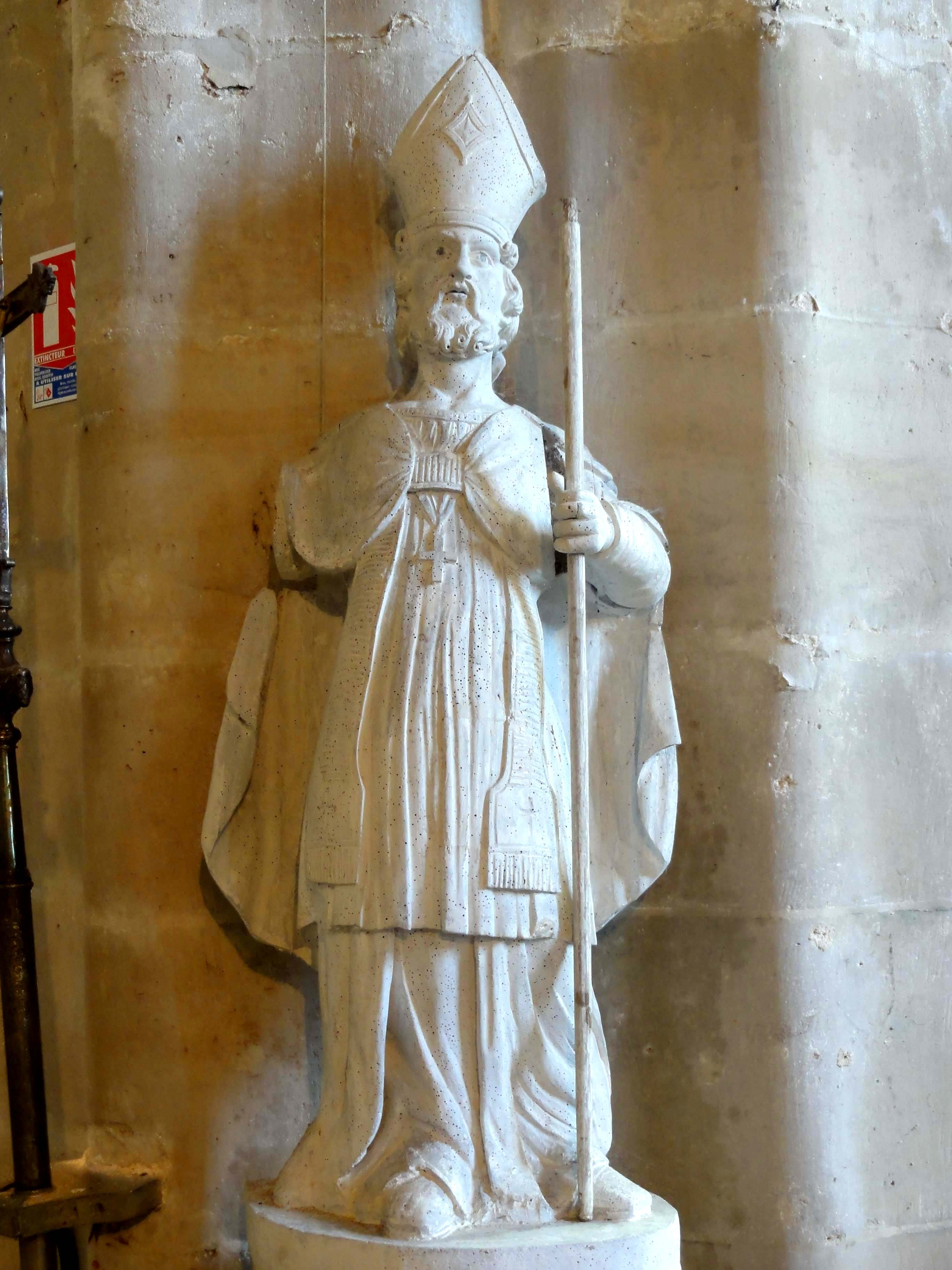 Mobilier de l'église (voir titre).